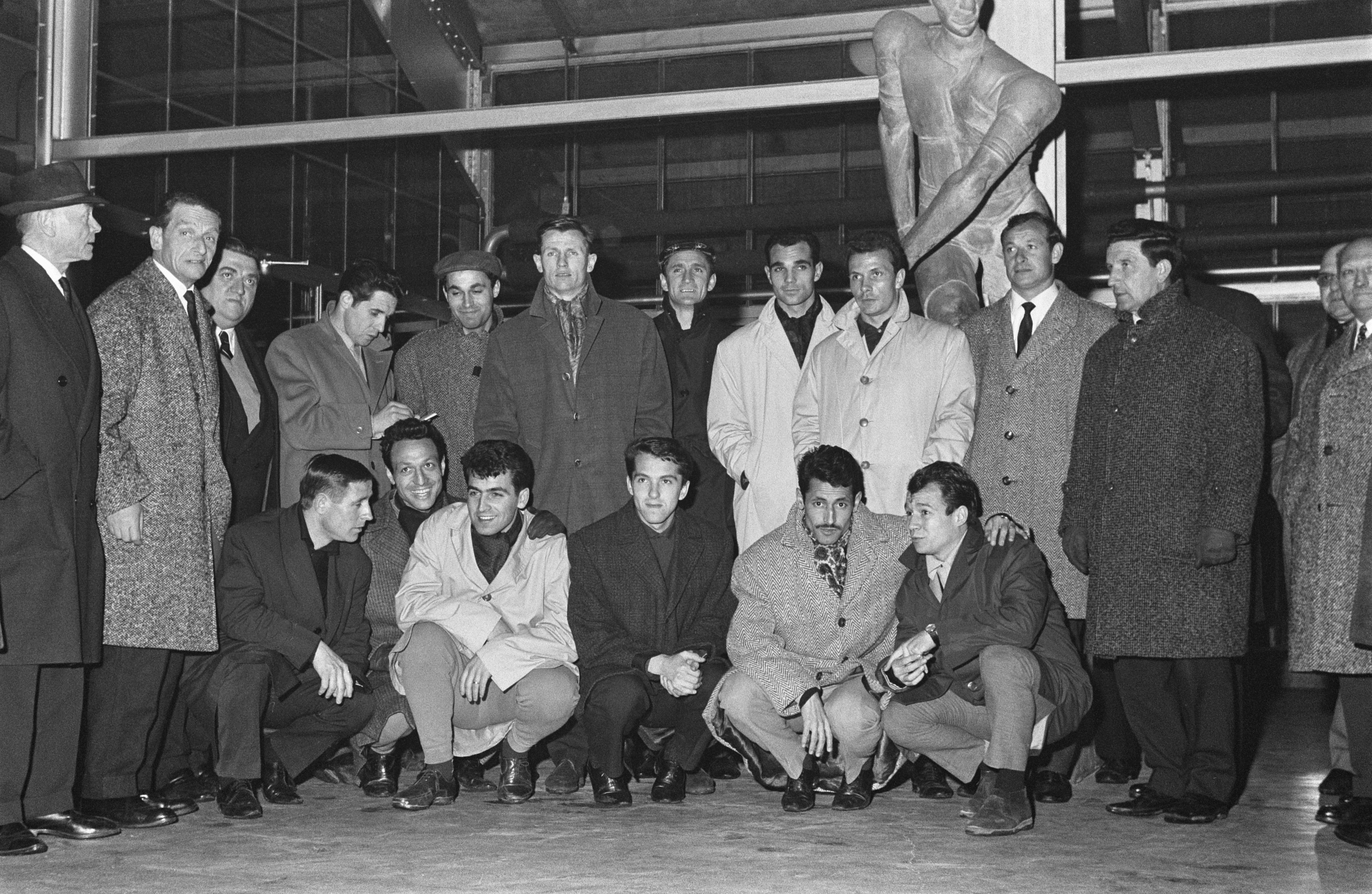 Collectie / Archief : Fotocollectie Anefo Reportage / Serie : [ onbekend ] Beschrijving : Reims in Rotterdam, het elftal van Reims Datum : 12 maart 1963 Locatie : Reims, Rotterdam Trefwoorden : elftallen Fotograaf : Koch, Eric / Anefo Auteursrechthebbende : Nationaal Archief Materiaalsoort : Negatief (zwart/wit) Nummer archiefinventaris : bekijk toegang 2.24.01.05 Bestanddeelnummer : 914-9171